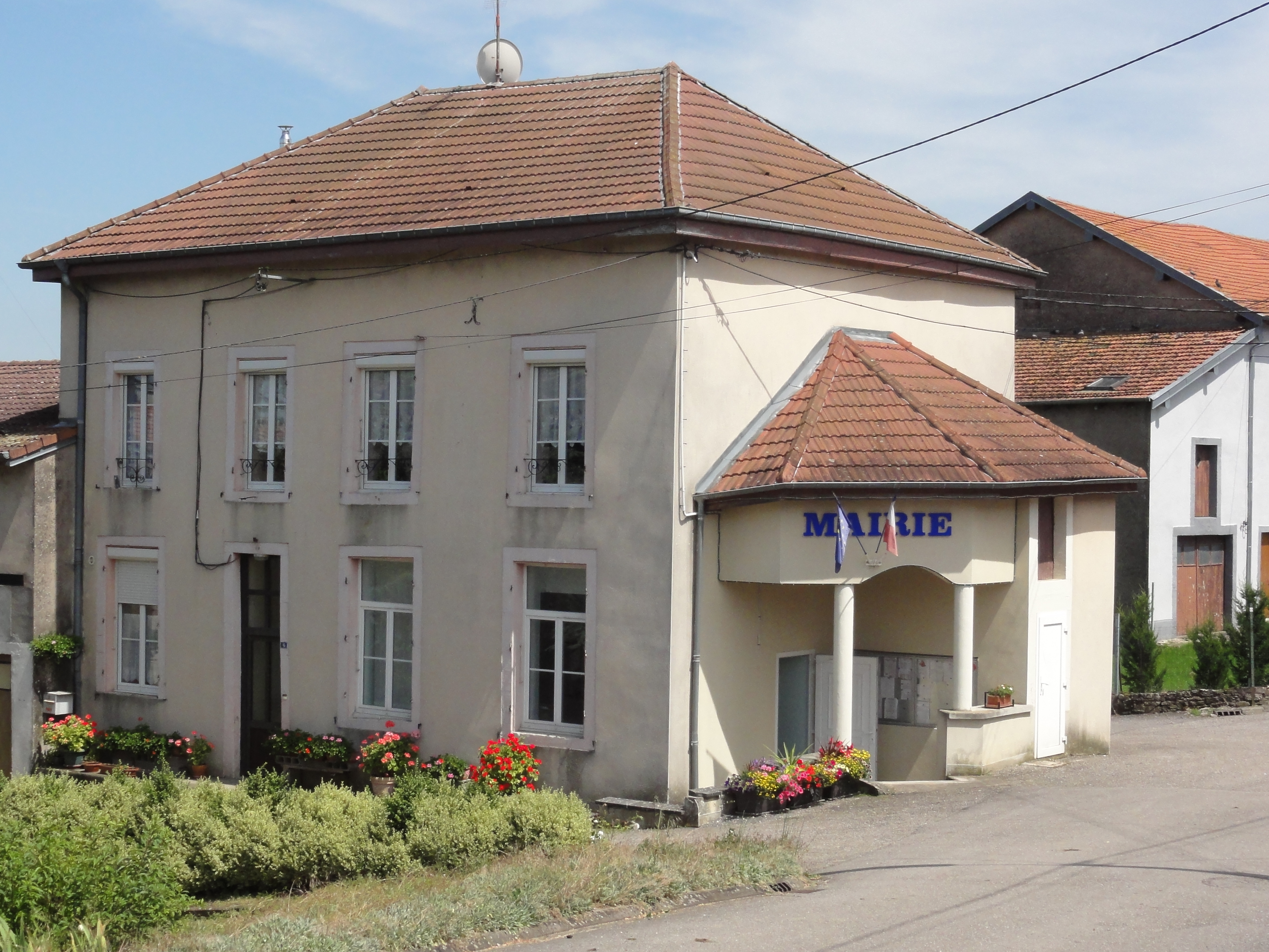 Montigny (M-et-M) mairie